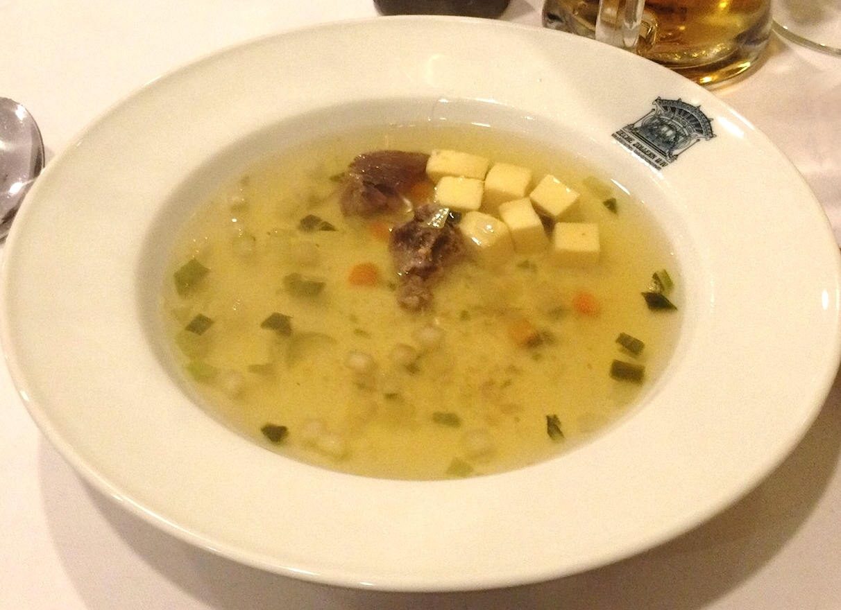 Ein Teller klare Rindfleischsuppe, mit Eierstichwürfeln als Einlage.